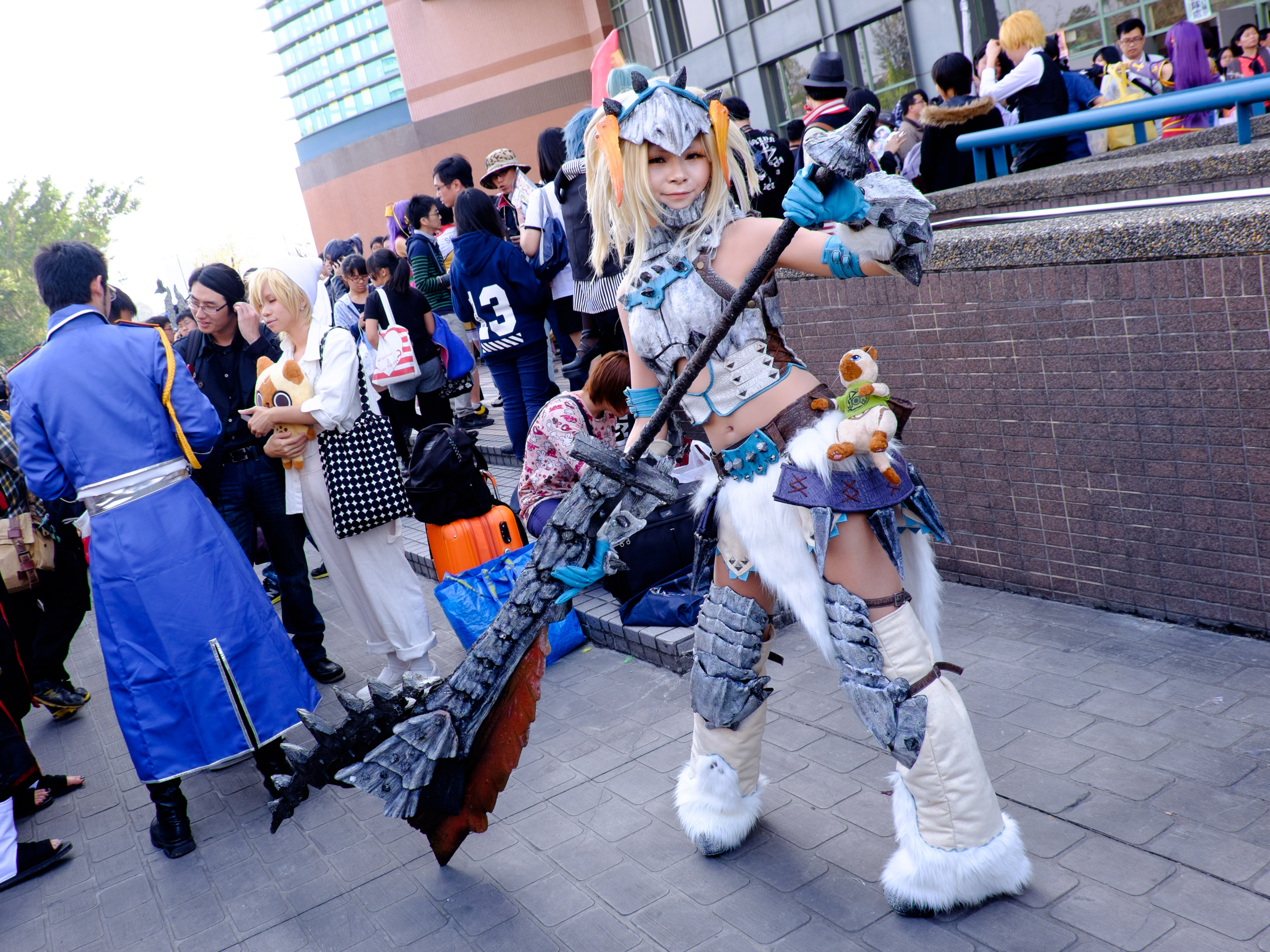 CWT39第一日下午，＜魔物獵人＞女劍士冰牙龍裝Cosplayer。